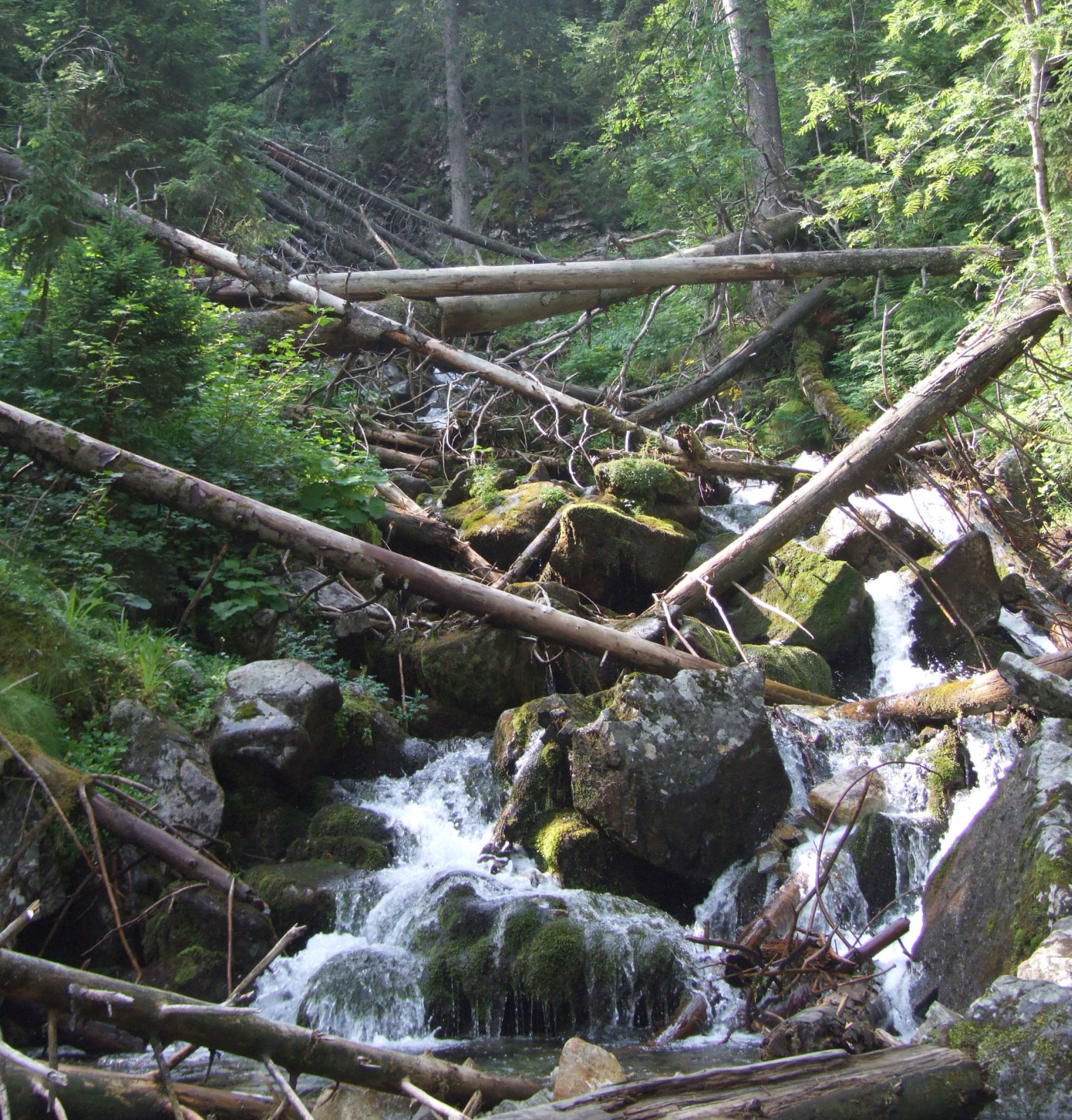 Spadowy Potok (Rohacka Dolina, West tatra Mountains)